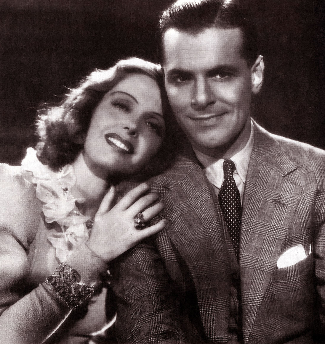 Francesca Braggiotti e John Lodge